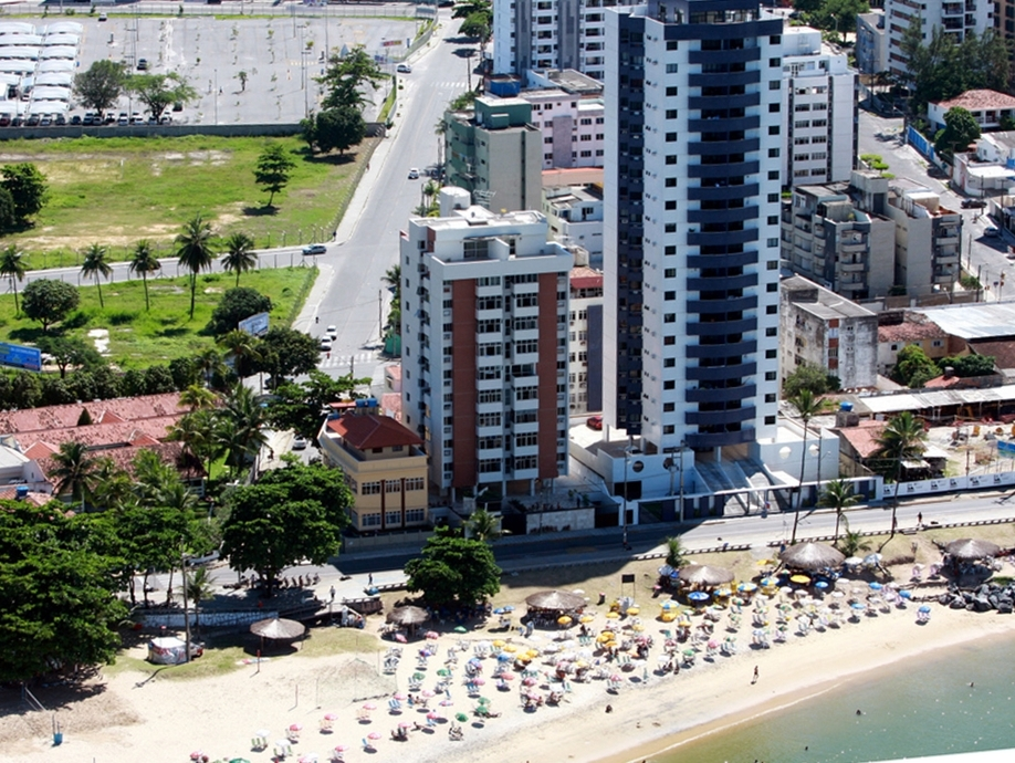 Vista aérea da orla de Casa Caiada